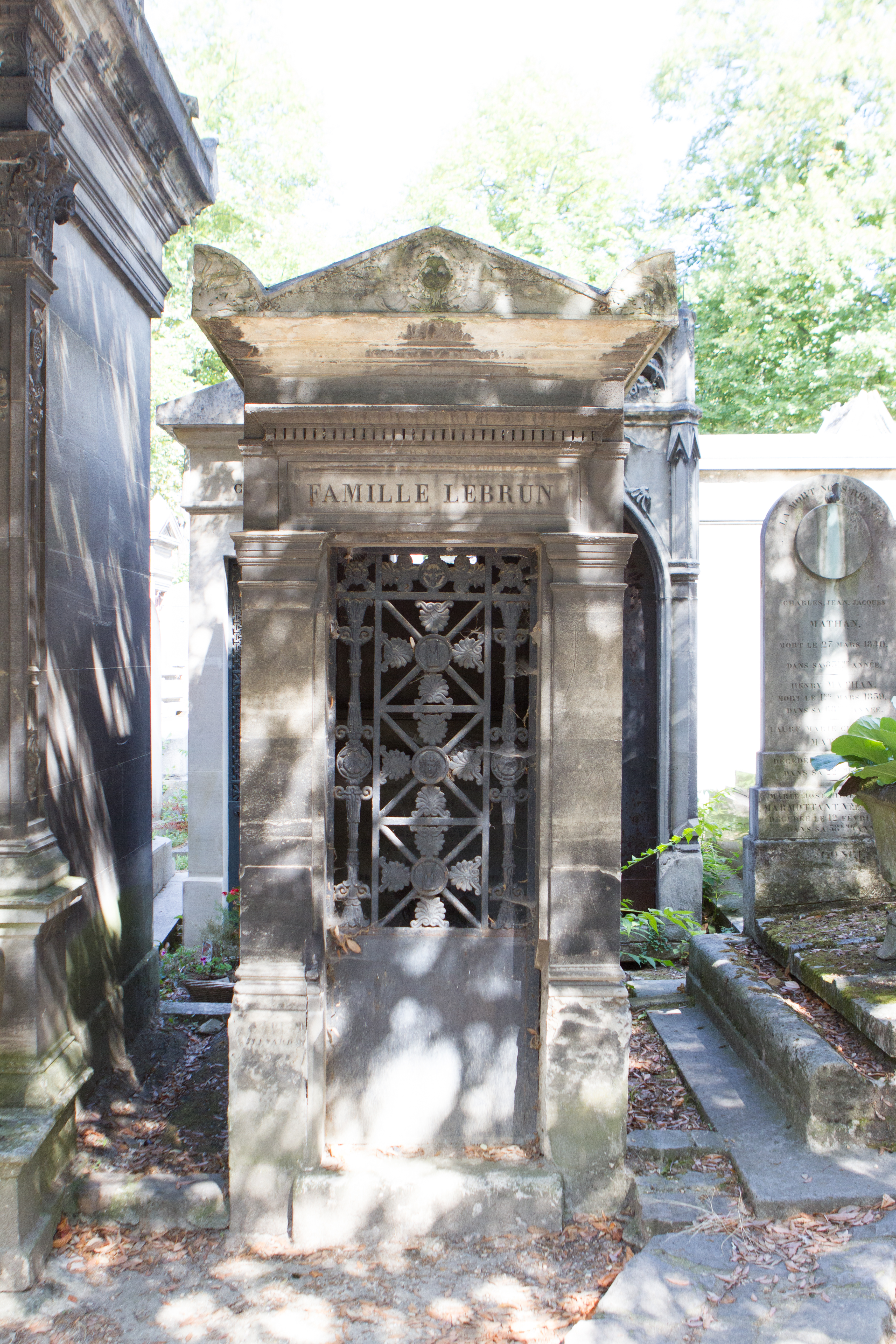 Sépulture d'Anaïs de Bassanville (1802-1884), écrivaine et journaliste de presse féminine ; Paul Le Brun de Bassanville (1828-1910), officier de cavalerie.